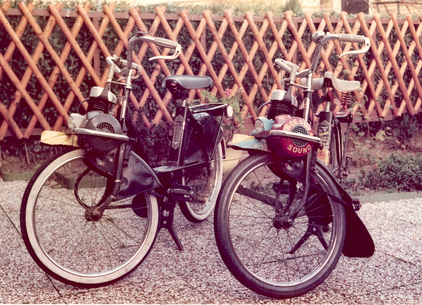 2 Solexen OTO- foto van ca 1977